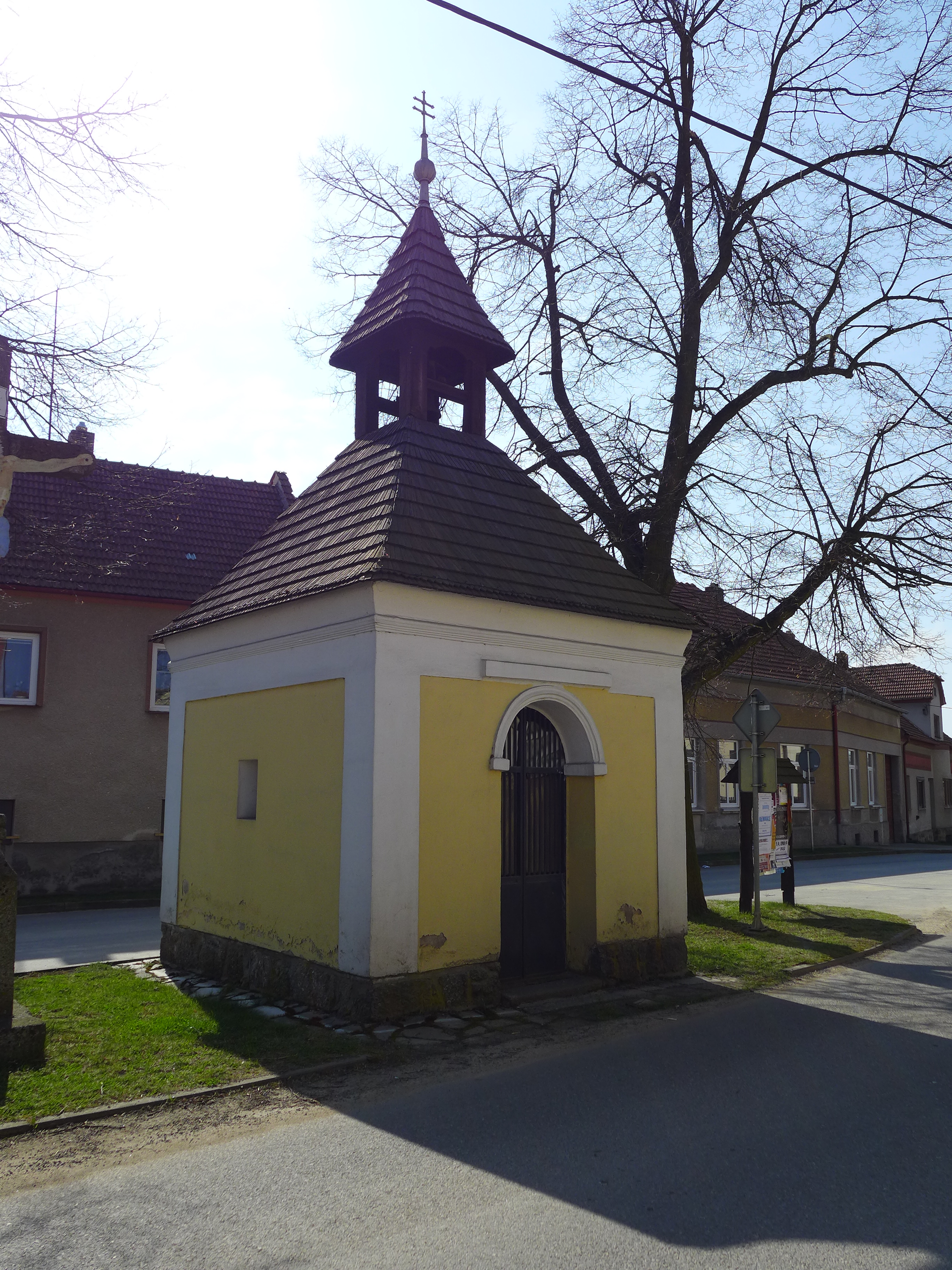 Kaplička (Nárameč), náves, Nárameč